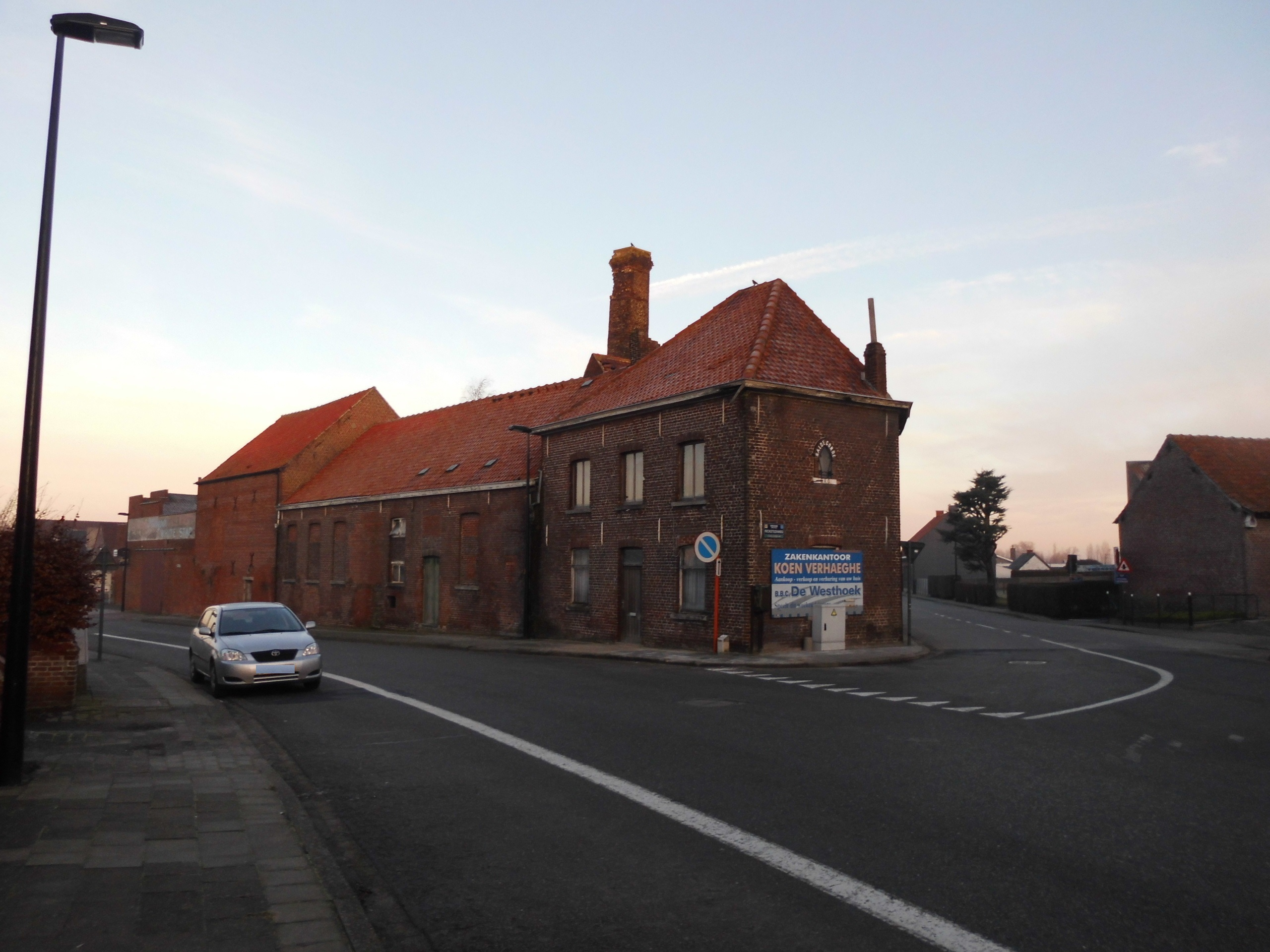 Brouwerij Callewaert - op de hoek van de Lichterveldestraat met de Ricksteenweg - Zwevezele - Wingene - West-Vlaanderen - België.